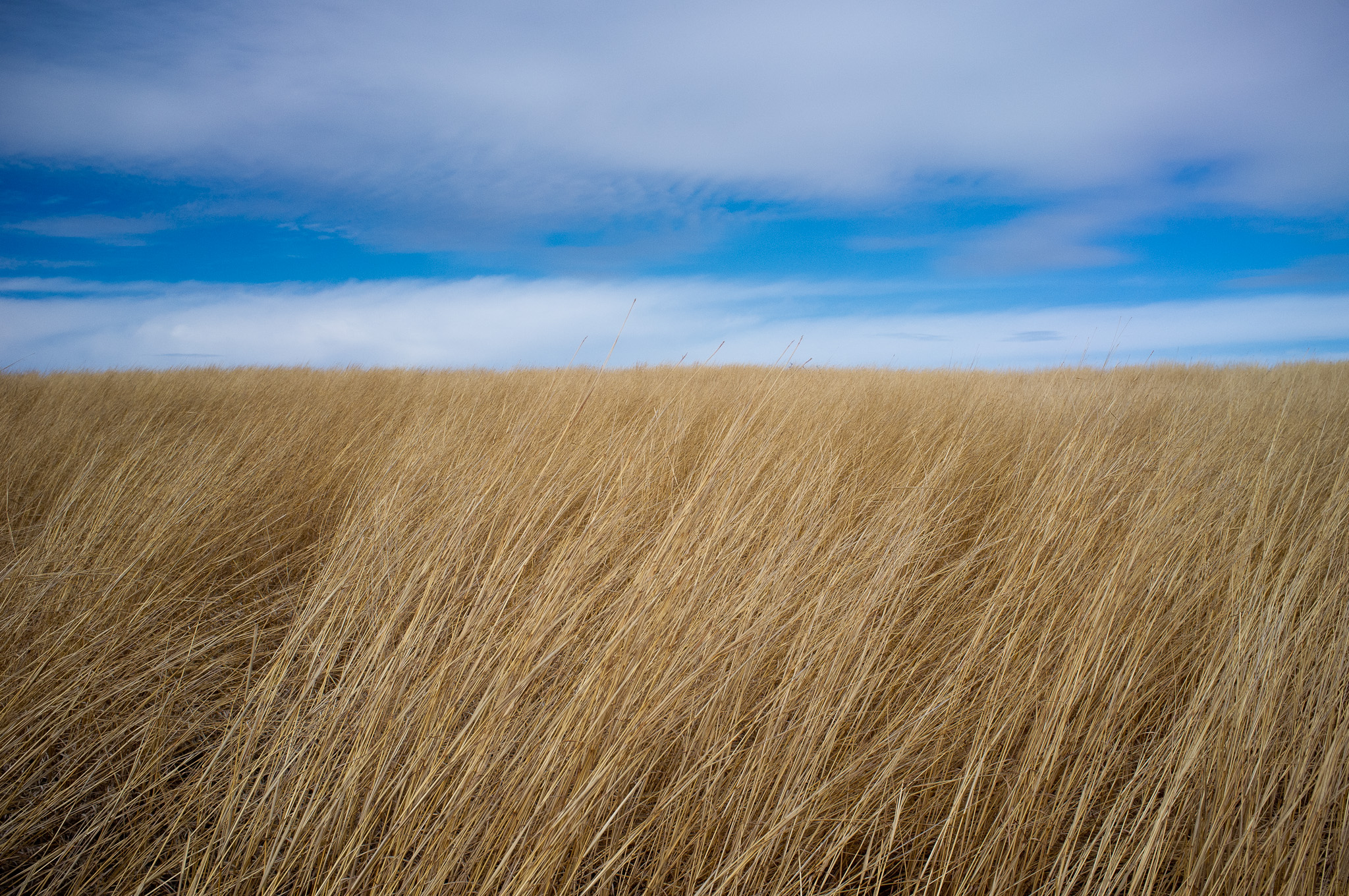 Prairie